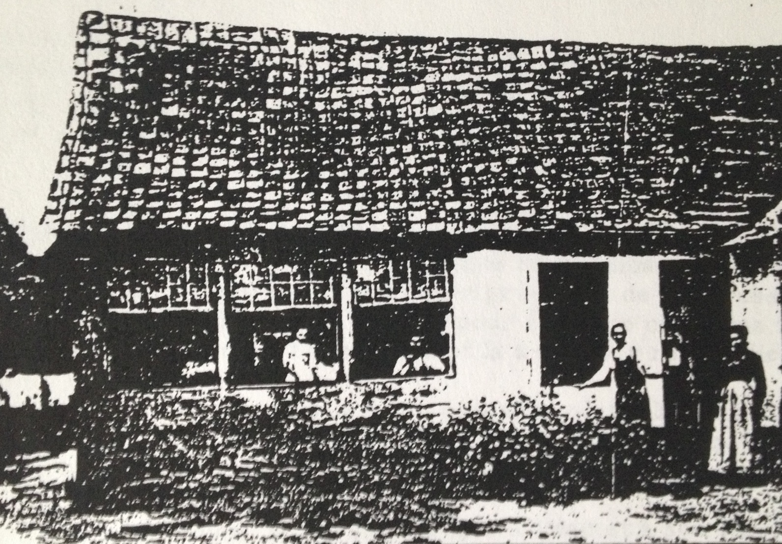 Atelier de Serruriers à Feuquières en Vimeu, photographie tirée de l'ouvrage d'Albert Demangeon, La Picardie, 1905.